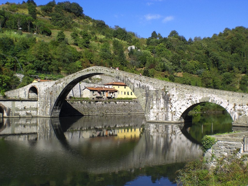 Ponte del Diavolo (Gargagnana)